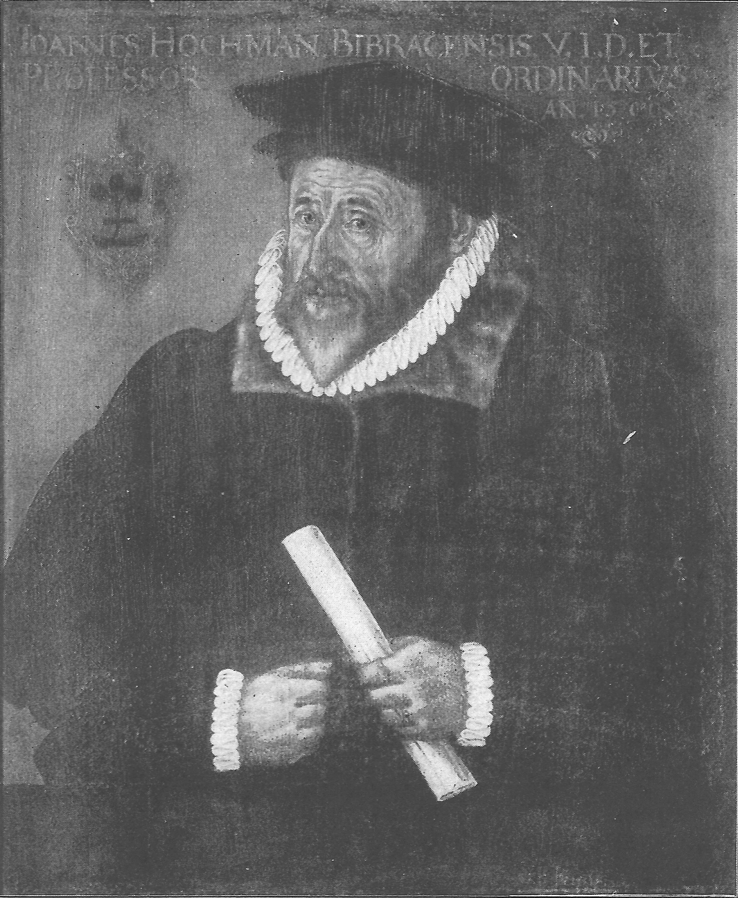 Johann Hochmann, Gemälde in der Tübinger Professorengalerie